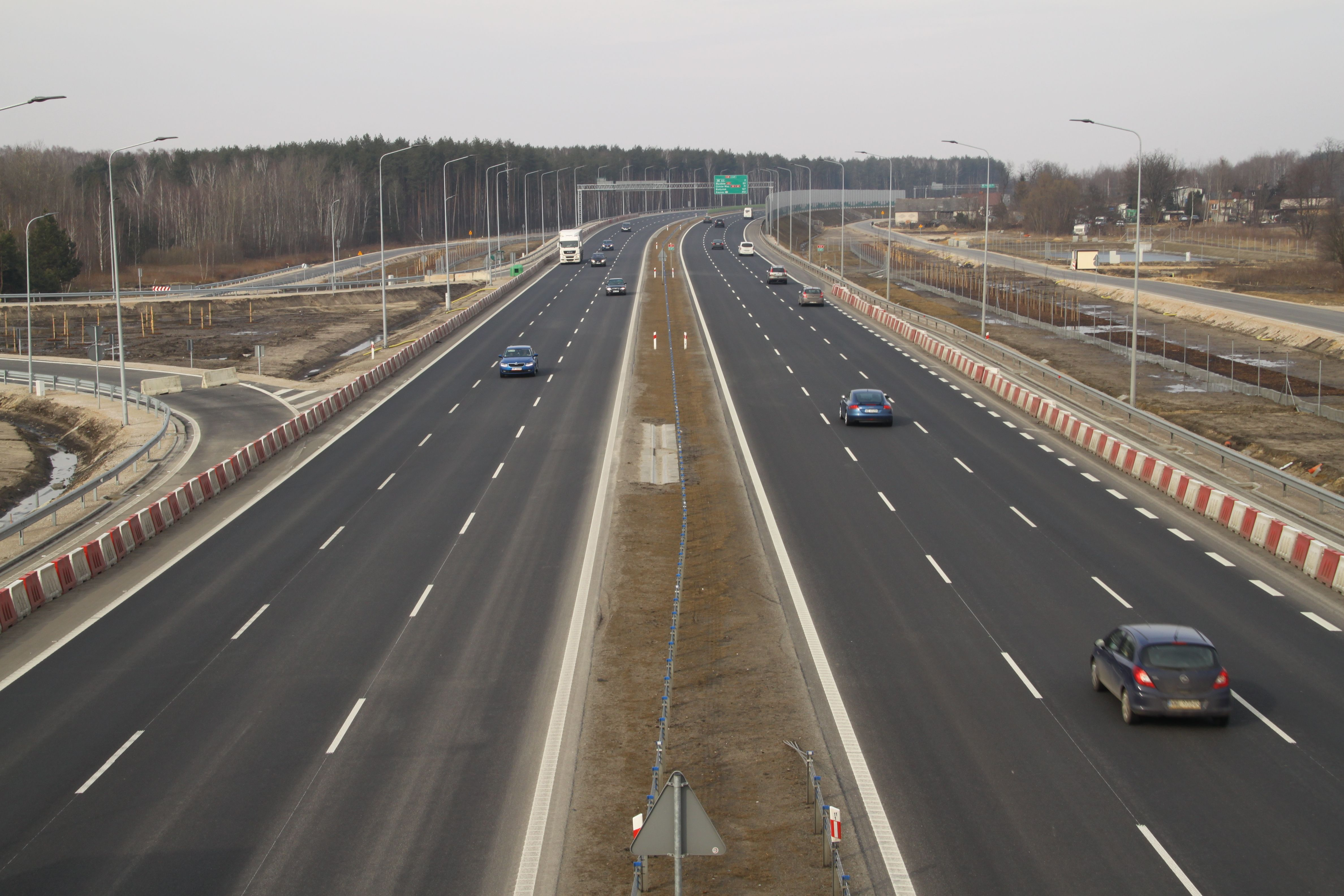 Widok z wiaduktu WD-9 na węźle Wołomin na Obwodnicę Marek, w kierunku Radzymina